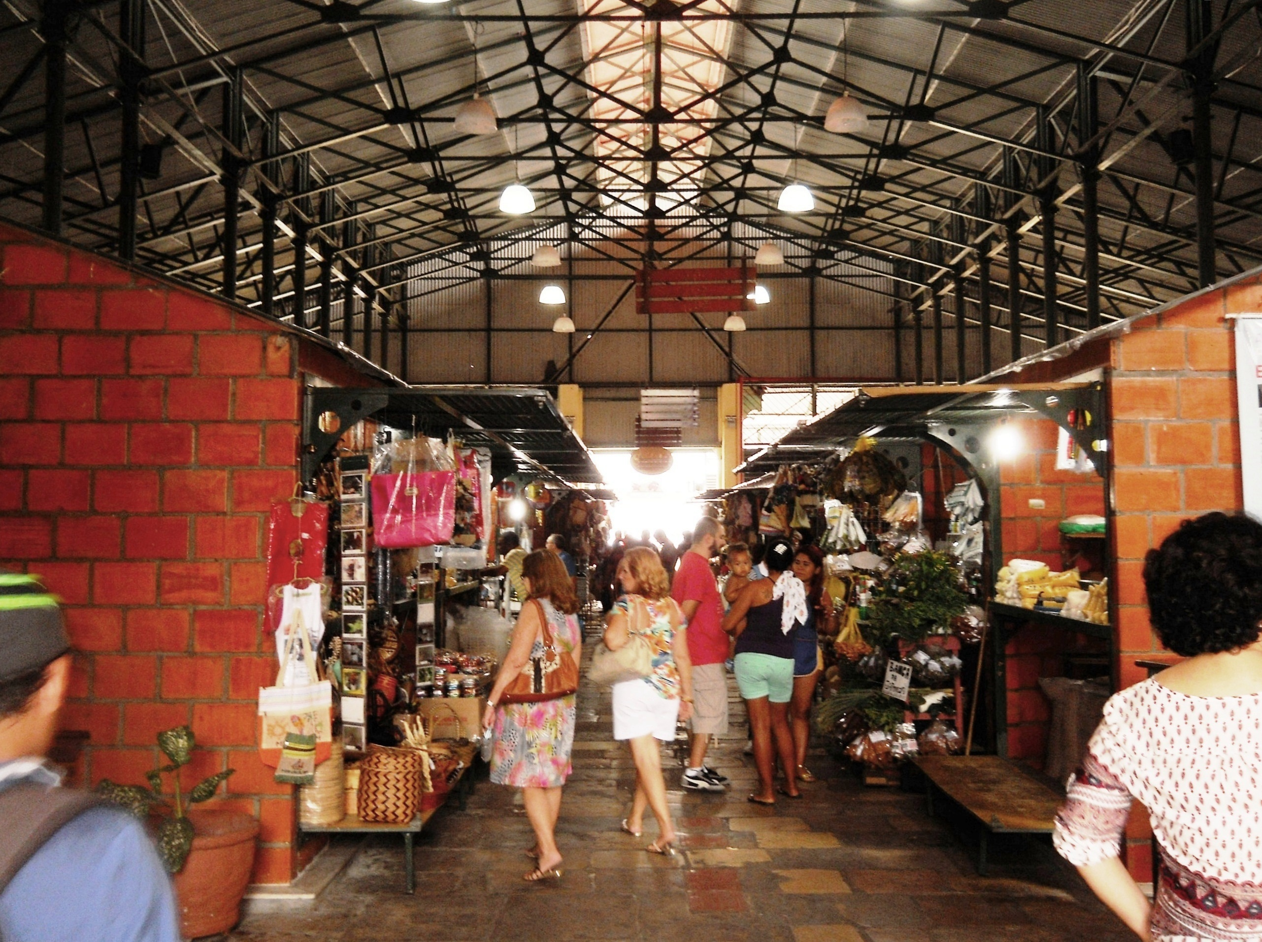 Imóvel denominado Mercado Adolfo Lisboa ou Mercado Municipal, compreendendo seus pavilhões e jardins, embarcadouro e trecho correspondente da margem do rio